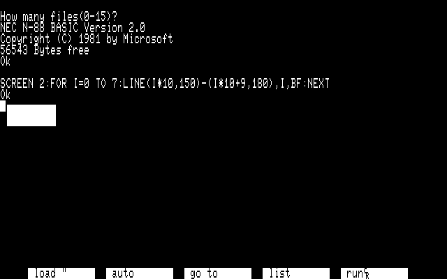 NEC N-88 Basic 2.0 400ラインモード